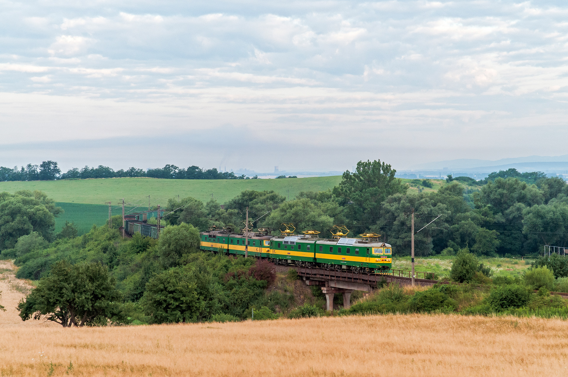 Širokorozchodné lokomotivy 125.826+825 a 830+829 vezou brzký ranní prázdný vlak ze železáren U.S. Steel Košice (v oparu v pozadí) na Ukrajinu úsekem mezi výhybnami Hornád a Slančík.